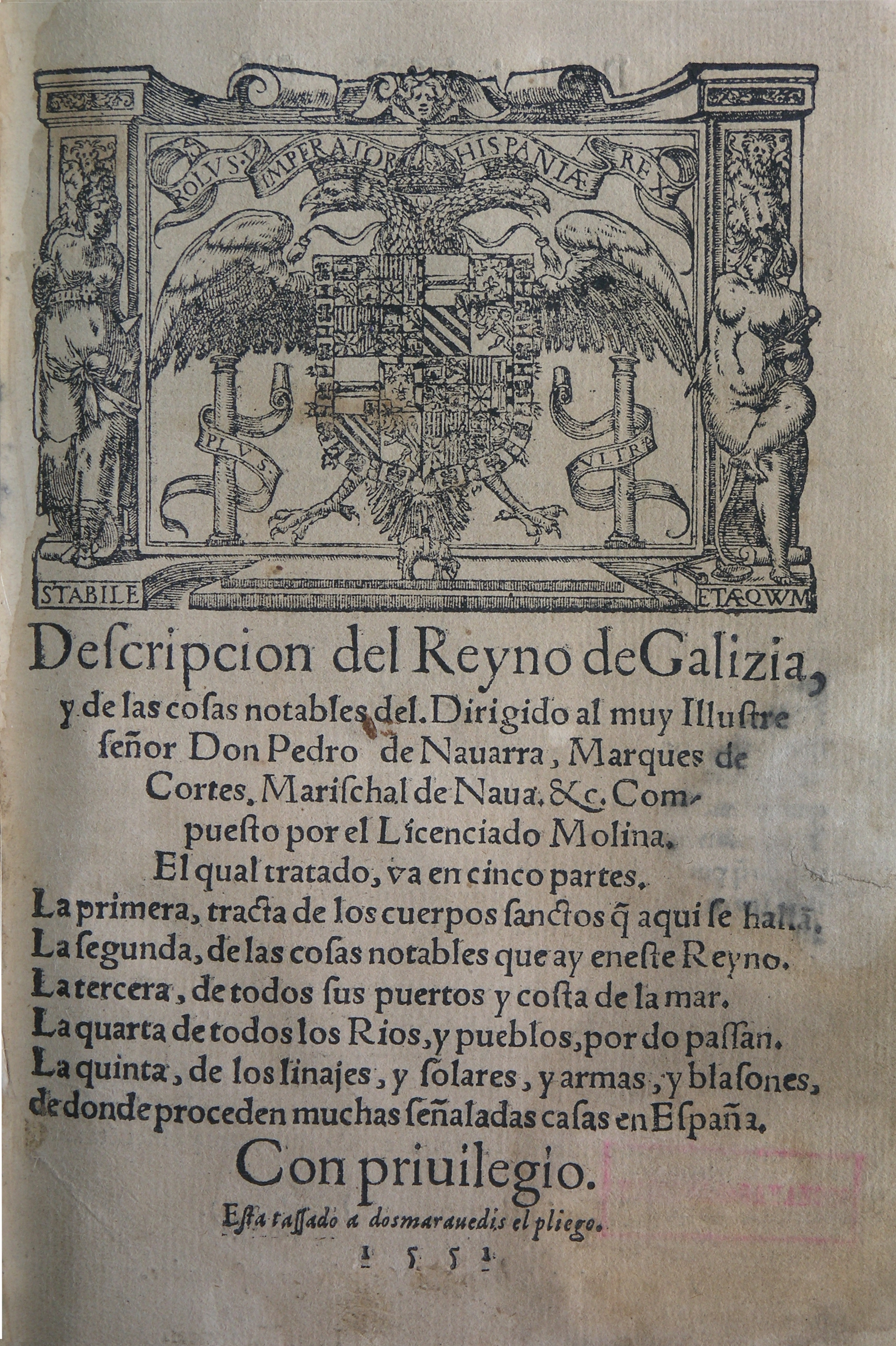 Portada da obra Descripcion del Reyno de Galizia y de las cosas notables del